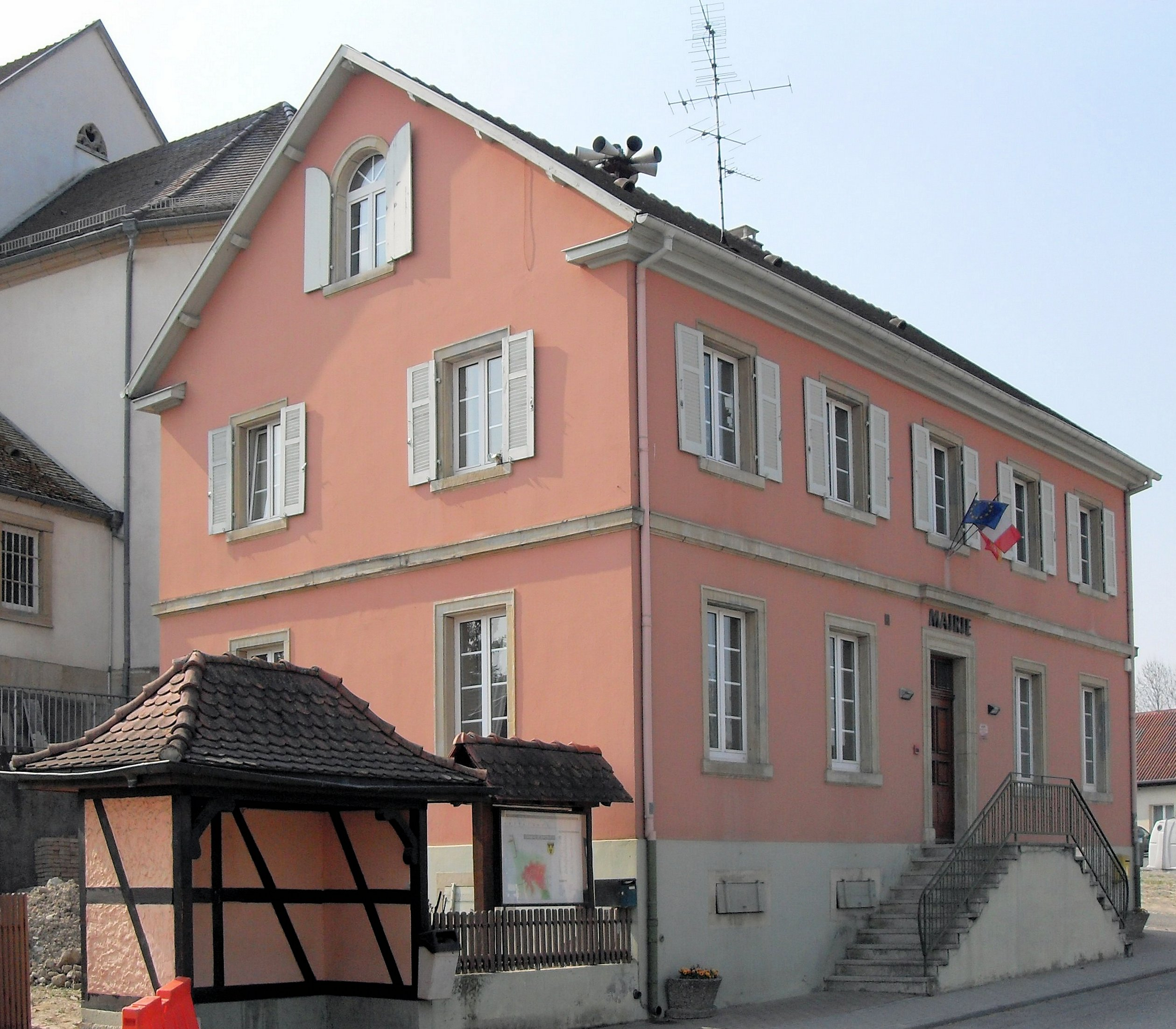 La mairie de Rantzwiller